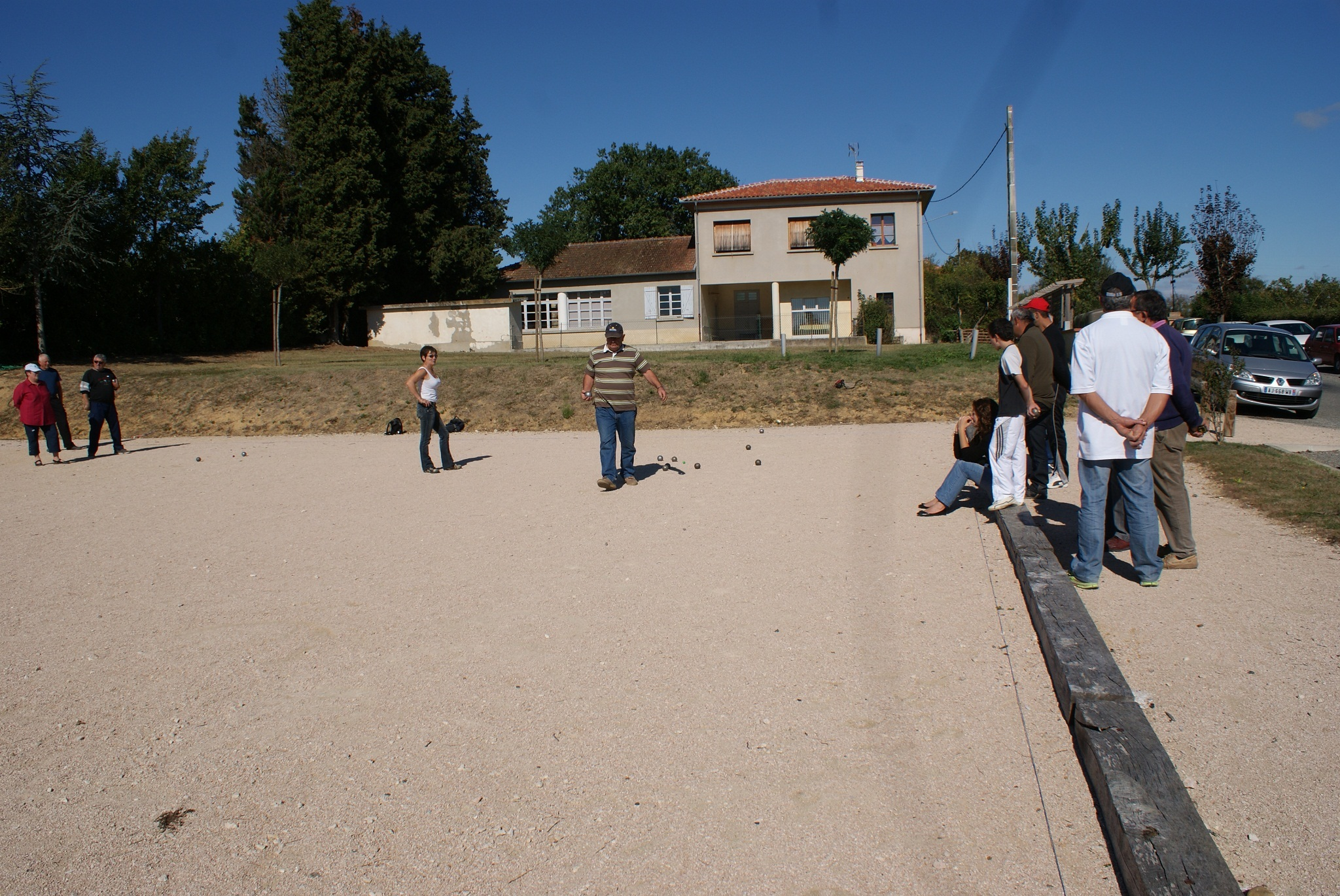 Jeu de boule competitie.